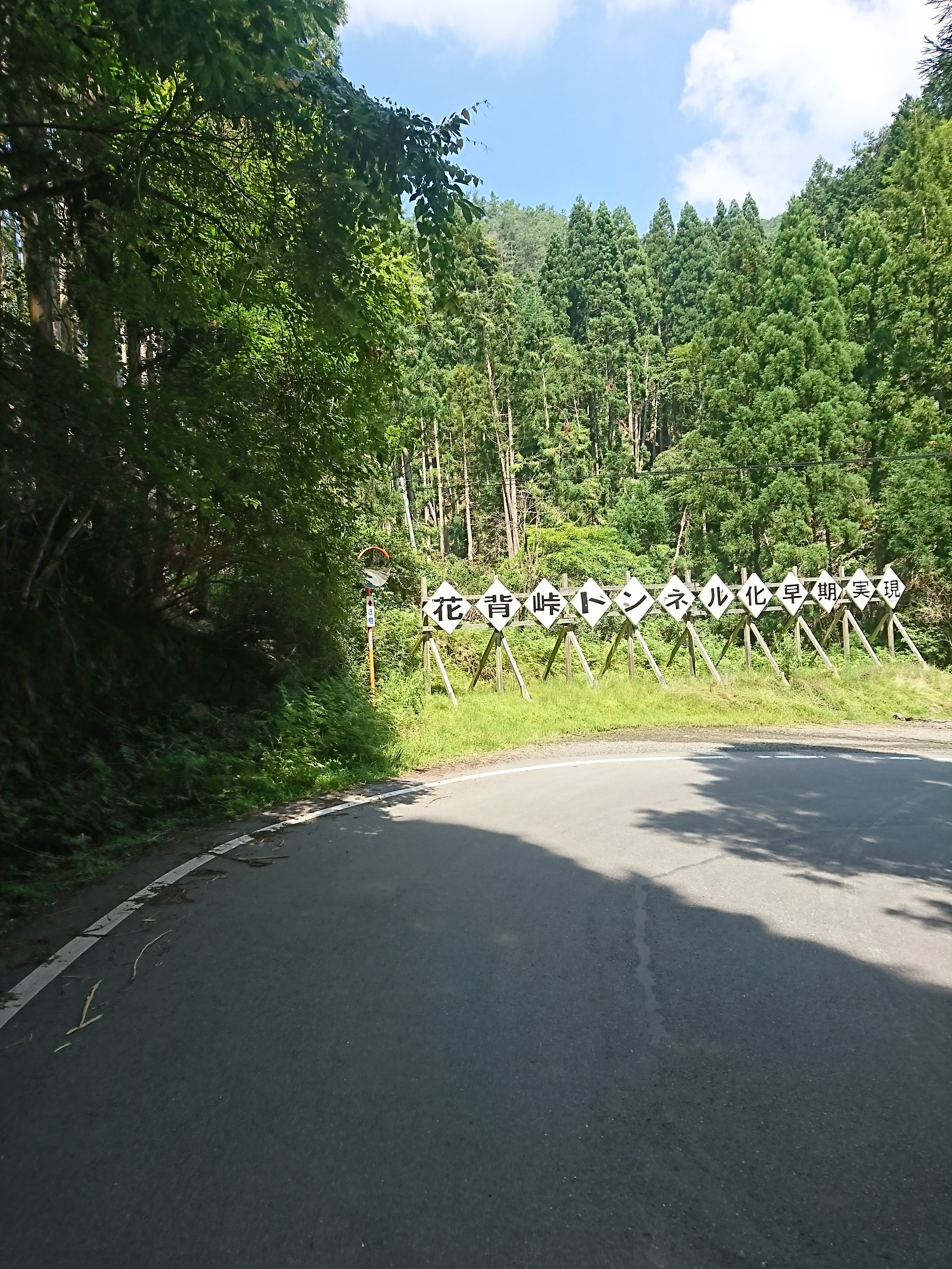 花脊峠の峠道の途中にある花脊峠トンネルの実現を訴える看板